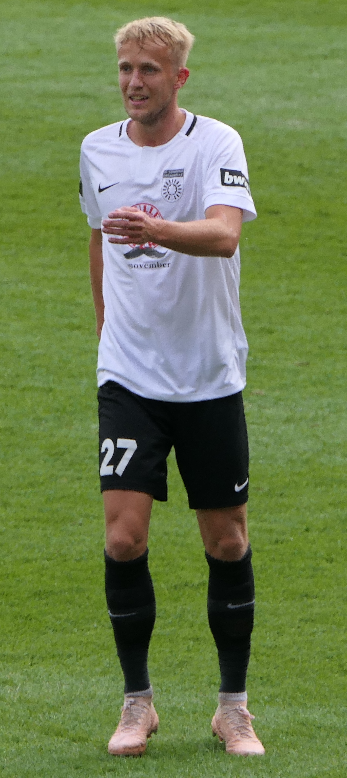 Der Fussballprofi Michael Vitzthum im Trikot der SG Sonnenhof Großaspach beim Heimspiel gegen Eintracht Braunschweig am 03.11.2018.